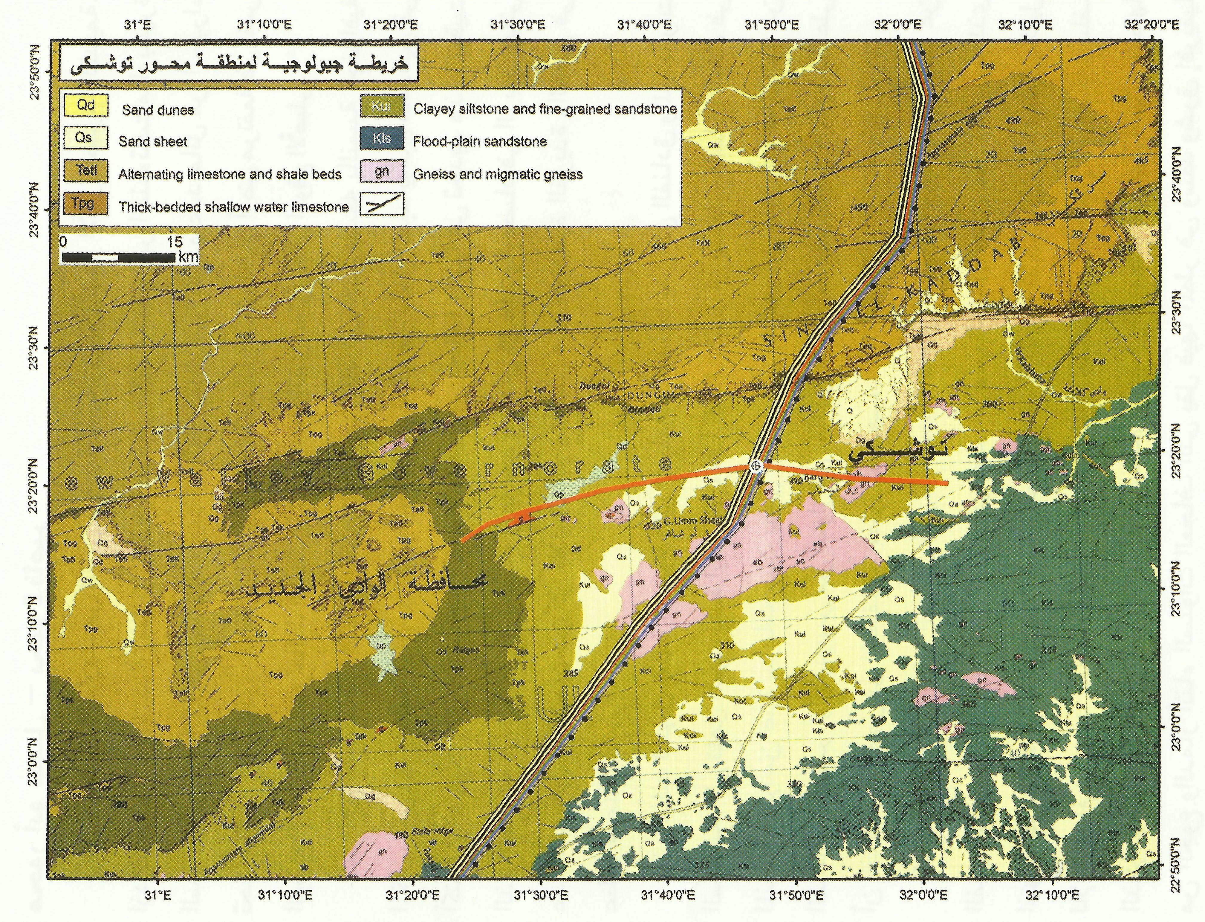 محور تعمير توشكى